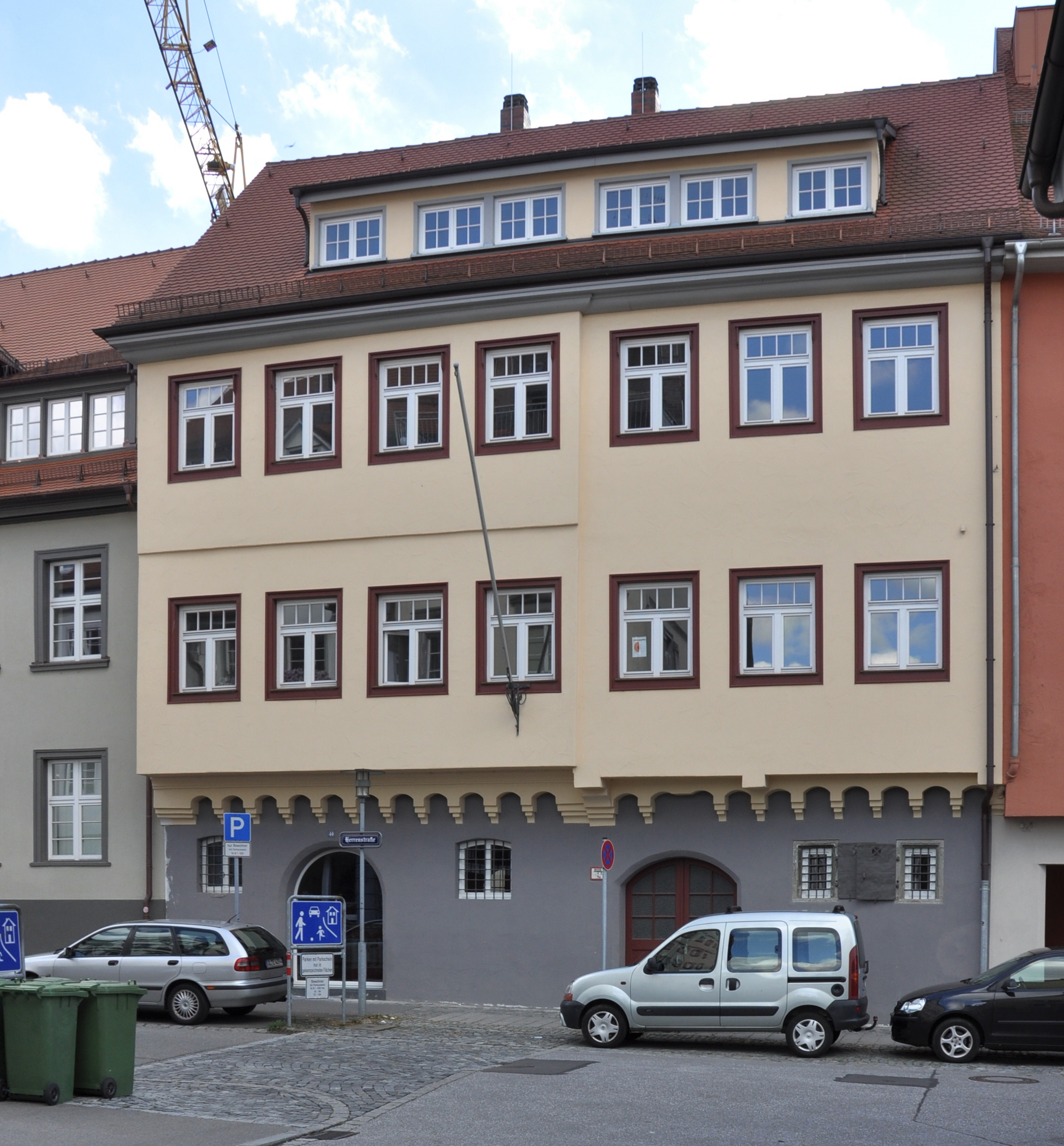 Ravensburg, Haus Herrenstraße 40, Teil des Amtsgerichts Ravensburg (bis 1791 Stadtkanzlei, 1810–1830 Oberamtssitz, sptäer wechselnde Ämter, zuletzt Gewässerdirektion)